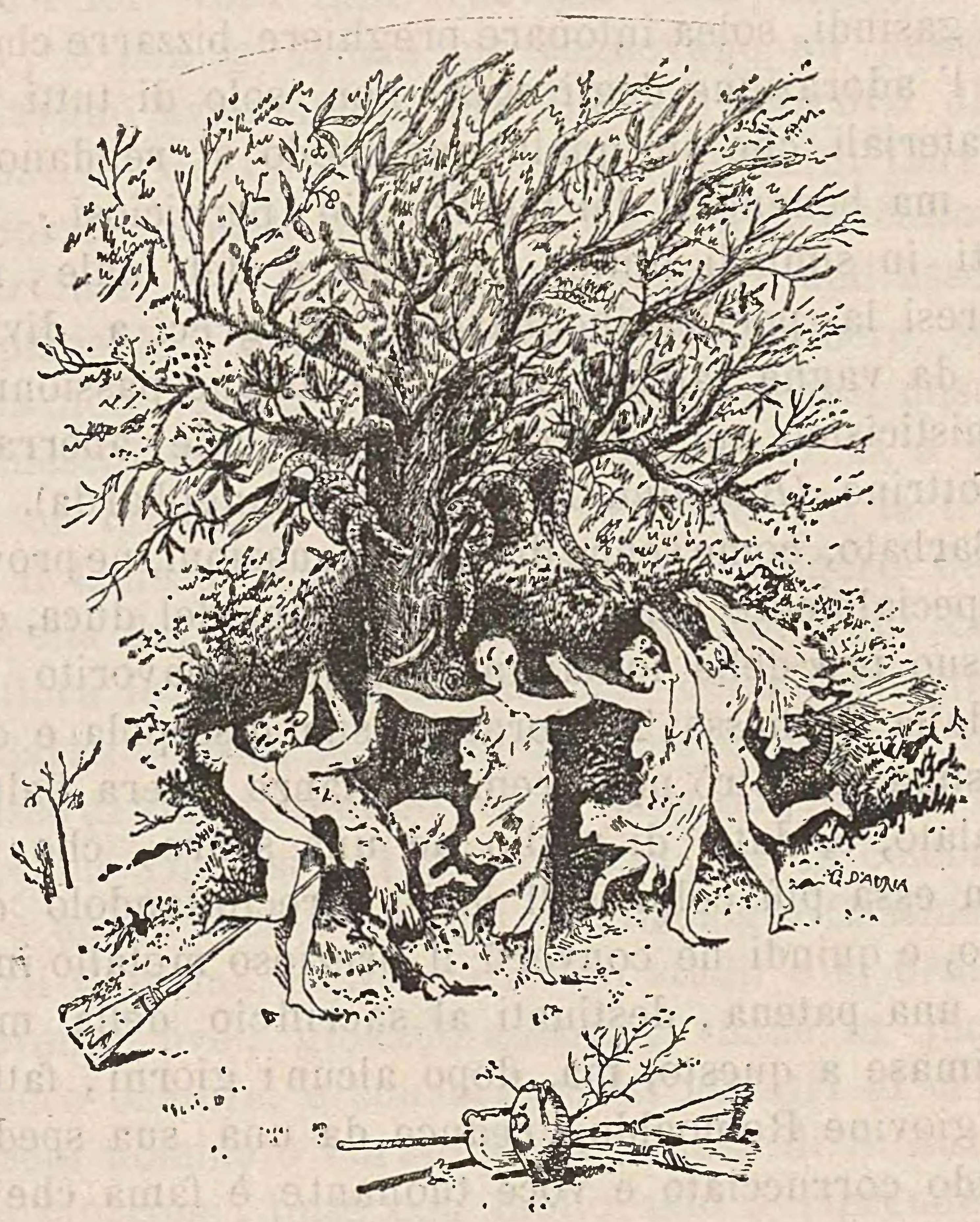 Illustrazione tratta da: Enrico Isernia, Istoria della città di Benevento dalla sua origine fino al 1894, Volume Primo, pag. 214, Benevento, Stabilimento Tipografico A. D'Alessandro e Figlio, 1895.